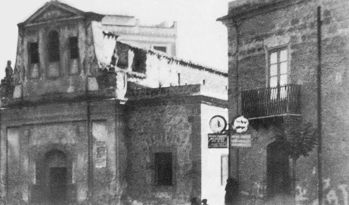 Chiesa di Santa Lucia a Caltanissetta prima del bombardamento del 9 luglio 1943. La foto riproduce in modo digitale la parte mancante della facciata rispetto l'originale.